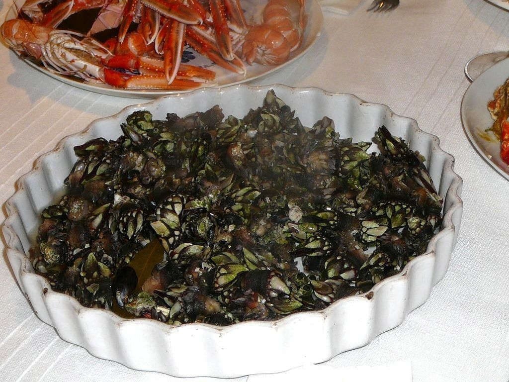 Los percebes de a Illa de Ons.